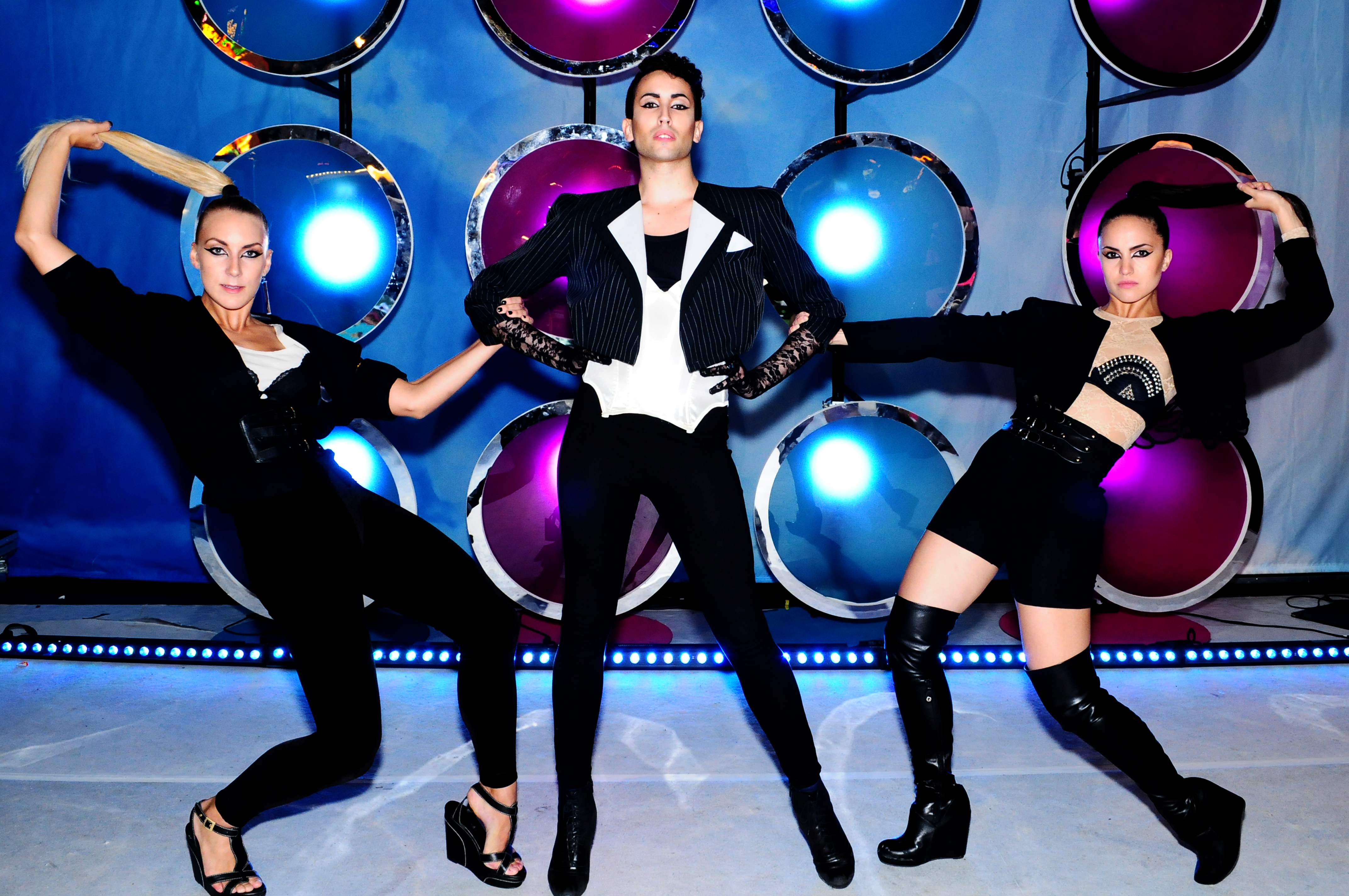 P'Fect dansar på Sommarkrysset